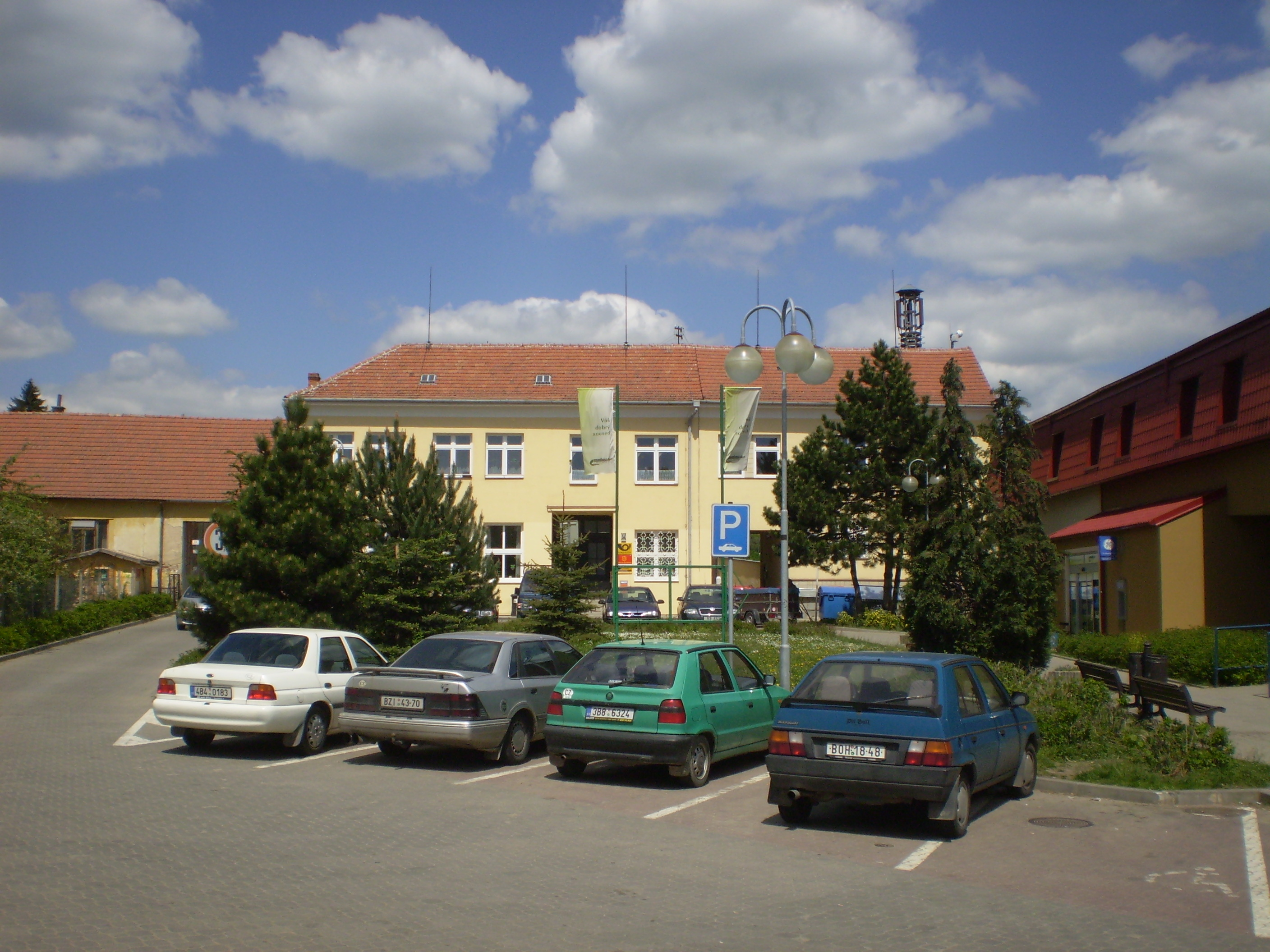 Brno-Žebětín, radnice.